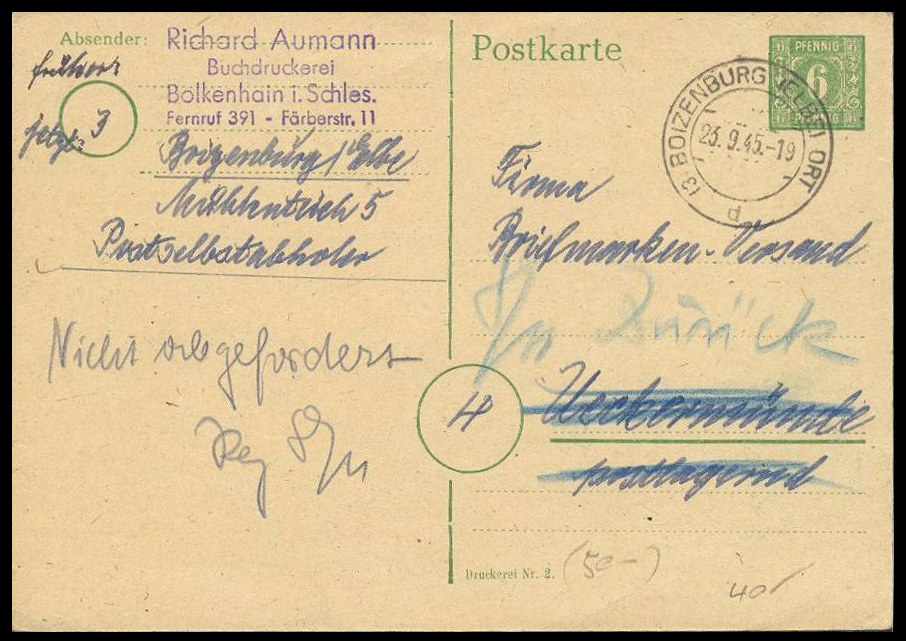 Почтовая карточка ГПДШверин для Мекленбурга-Передней Померании